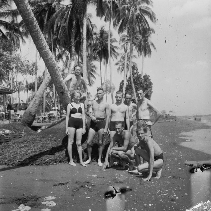 negatief. Militairen op Palm Beach bij Tjilintjing